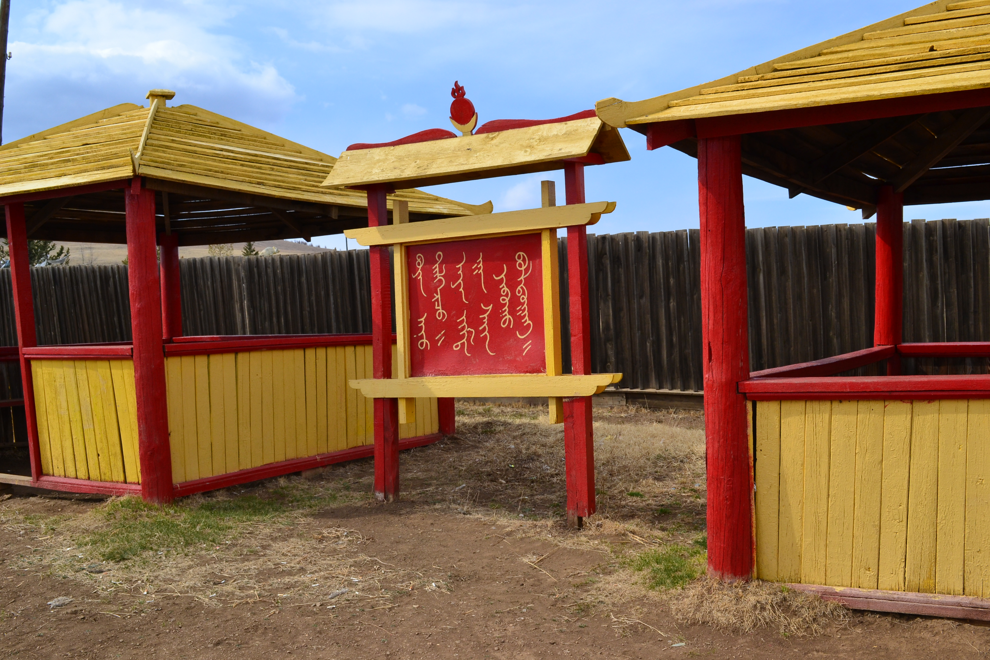 Сартул-Гэгэтуйский дацан, село Гэгэтуй, Джидинский район, Республика Бурятия